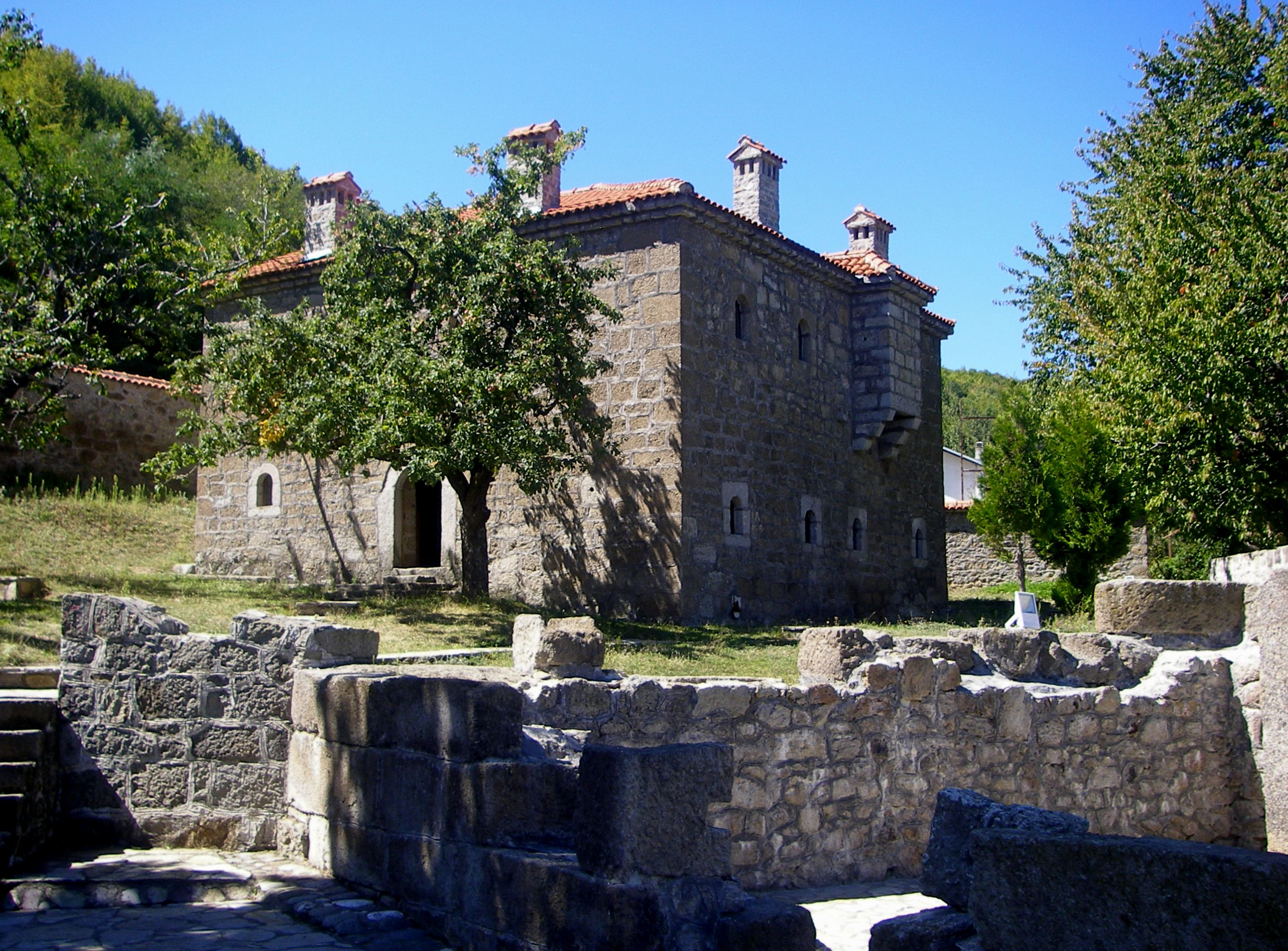 Kompleksi i Kullës së Isë Boletinit